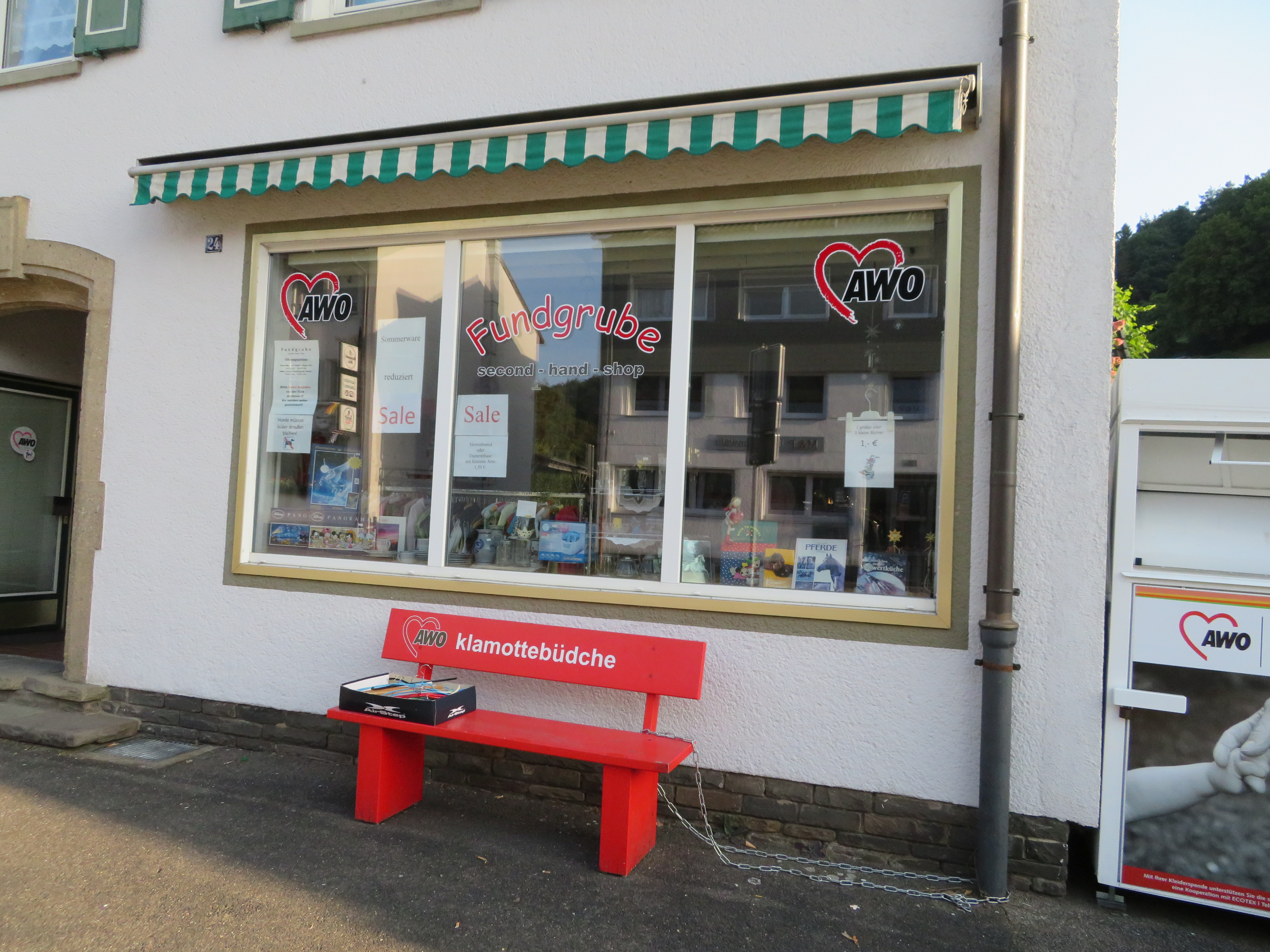 Laden der Arbeiterwohlfahrt in Engelskirchen, NRW